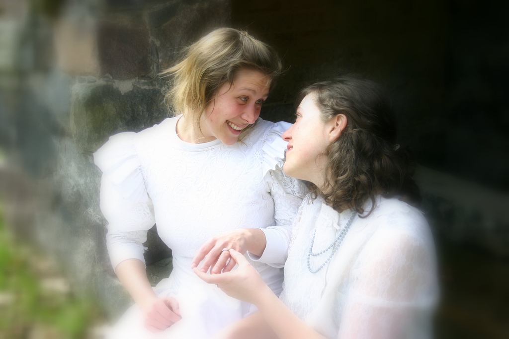 Lesbische Romantik